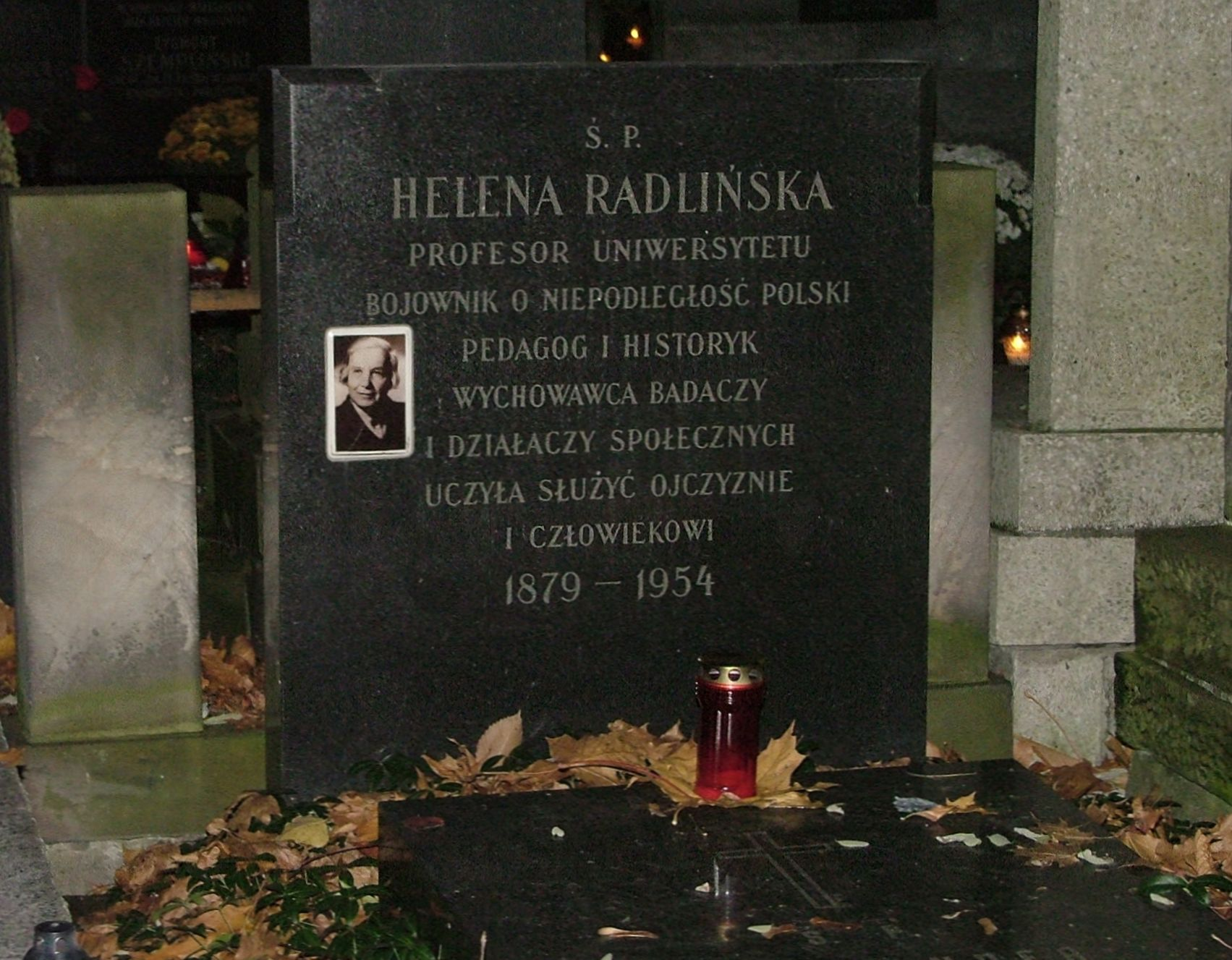 Cmentarz Powązkowski w Warszawie. Grób Heleny Radlińskiej